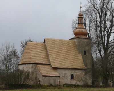 Kostel S. Markéty - Loukov, Dolní Město